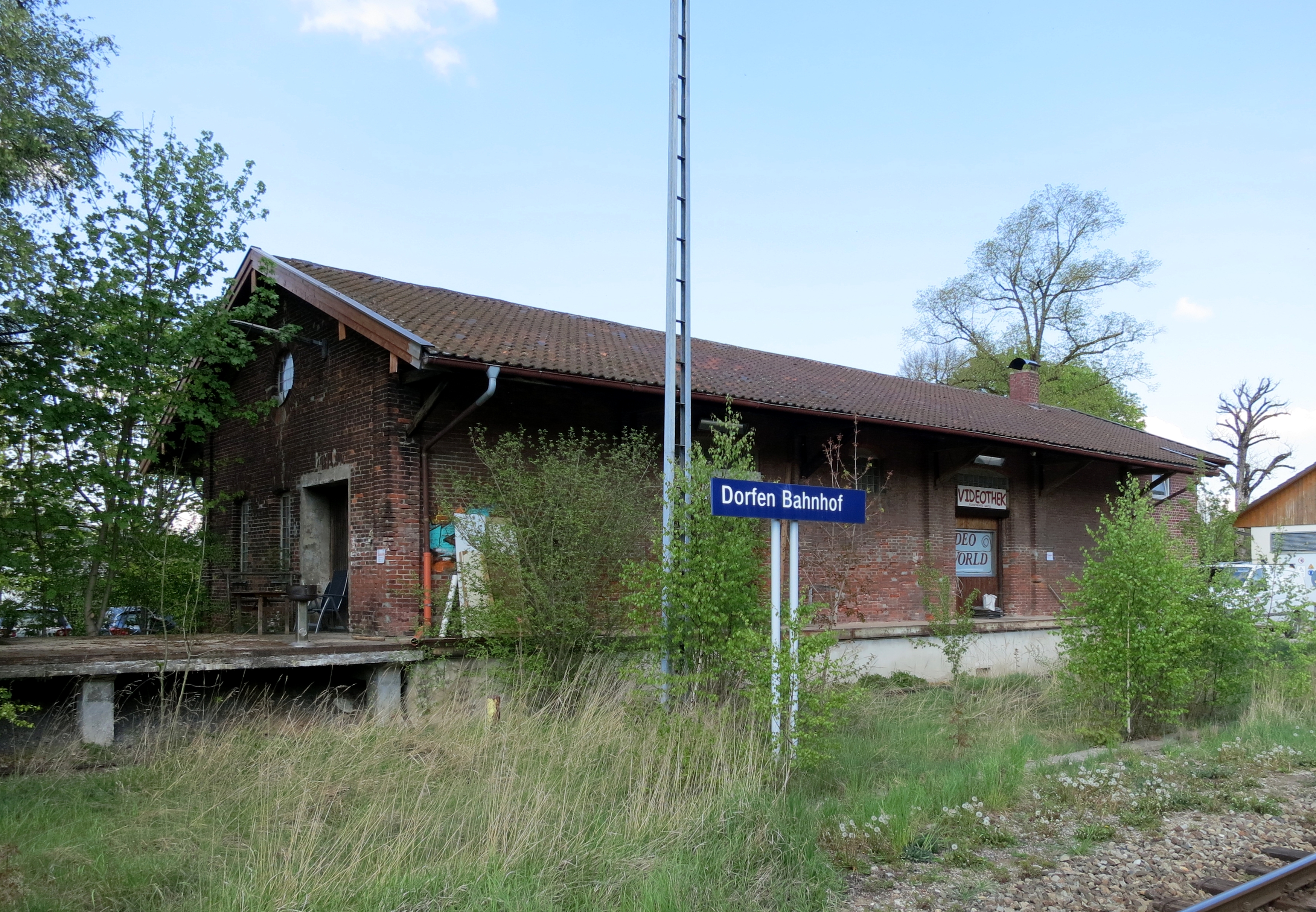 Ehemaliger Güterschuppen in Dorfen Bahnhof von der Gleisseite. 2016 wurde der Güterschuppen abgebrochen.